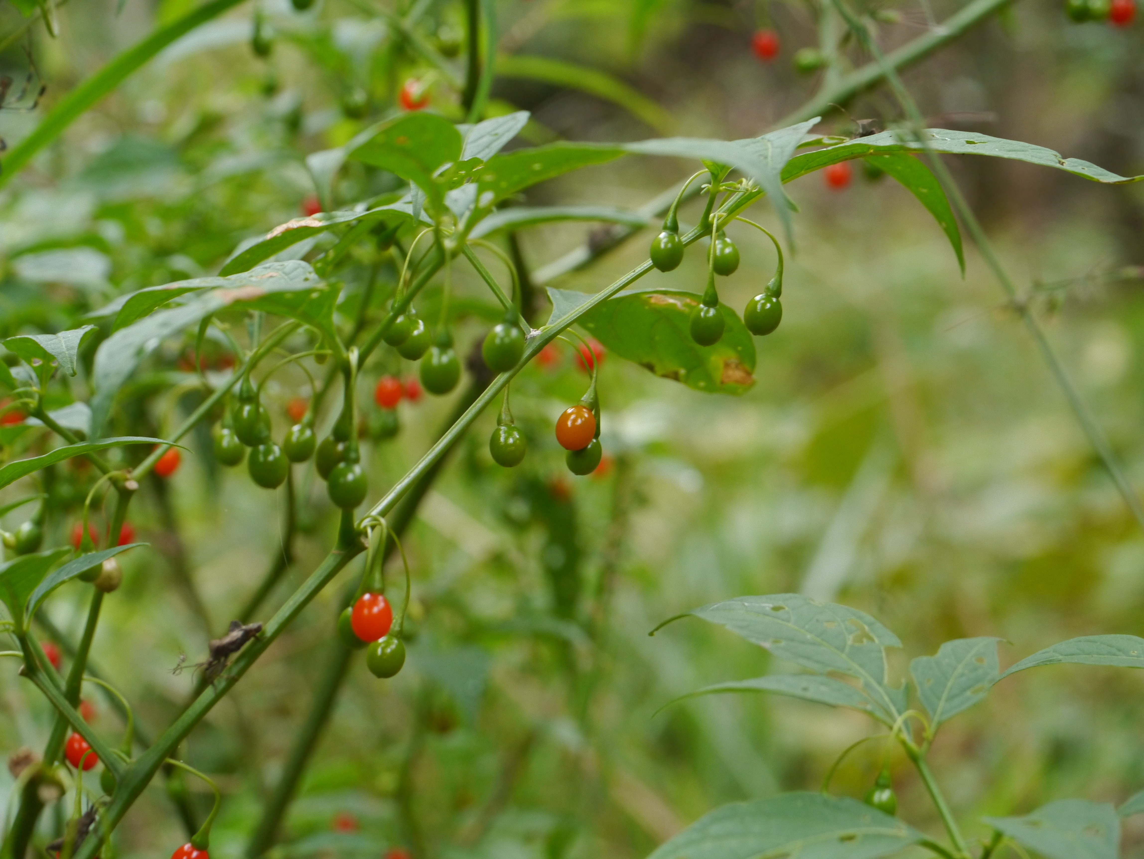 Tubacapsicum anomalum：ハダカホオズキ 2014/10/11 和歌山県田辺市：Tanabe City. Wakayama Pref. Japan